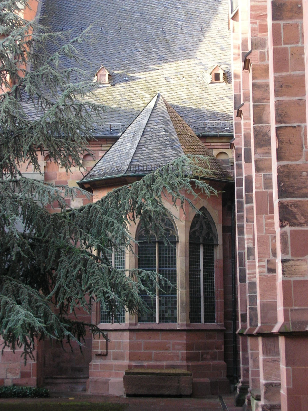 Der Ägidius-Chor der Memorie des Mainzer Doms